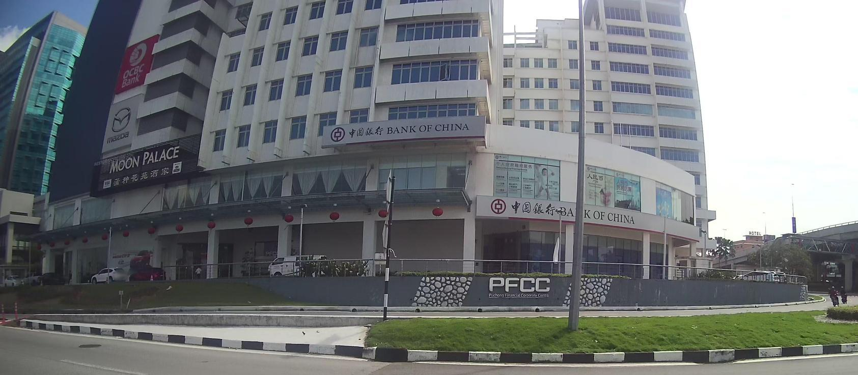 PFCC China Bank